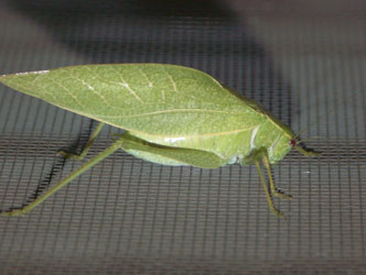 Chapulin (Saltamontes). Foto tomada en Cuernavaca, Morelos, Mexico.